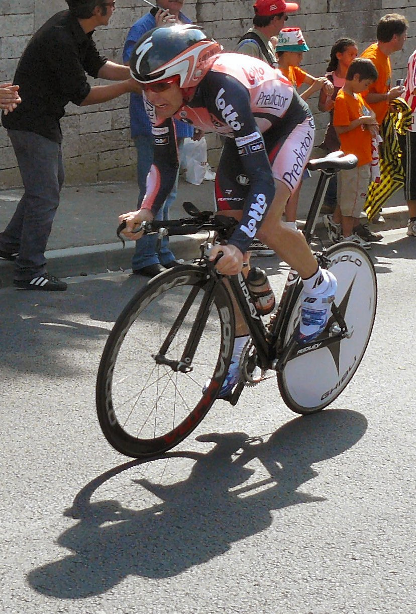 Cadel Evans, 19ème étape du Tour de France 2007